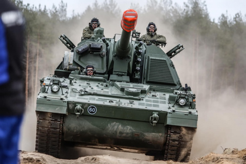 Savaeigė artilerinė sistema PzH2000